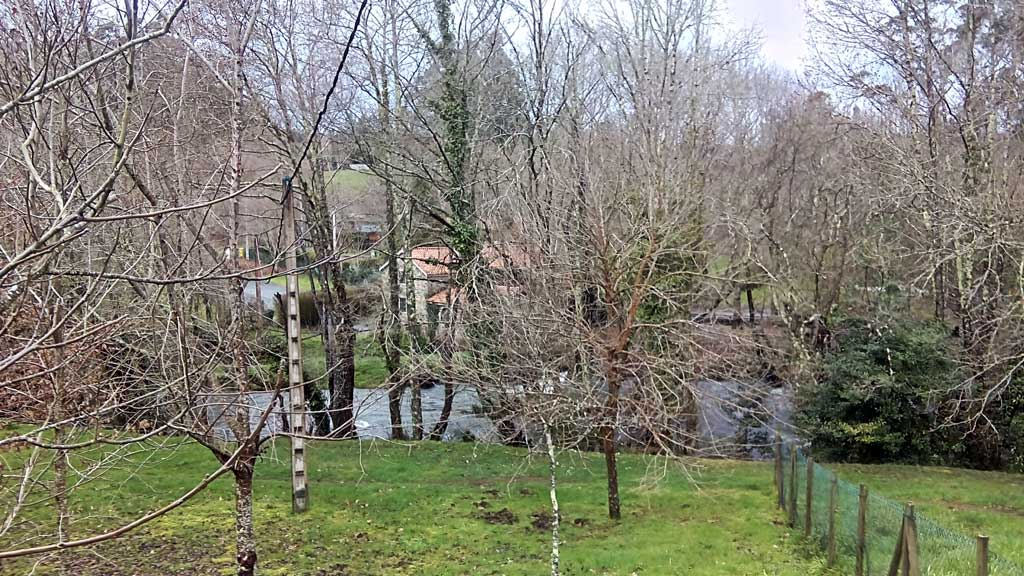 Vista do Muíño de Pedroso no río Xuvia dende Os Calvos, Doso, Narón.